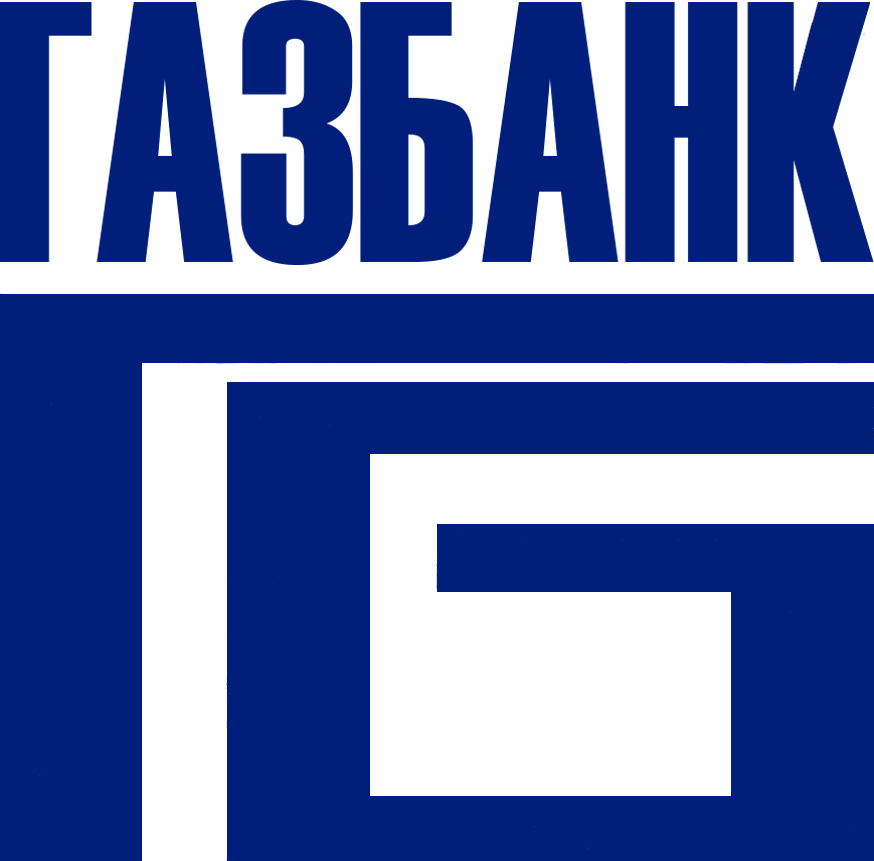 Логотип банка с 1993 по 2006 года